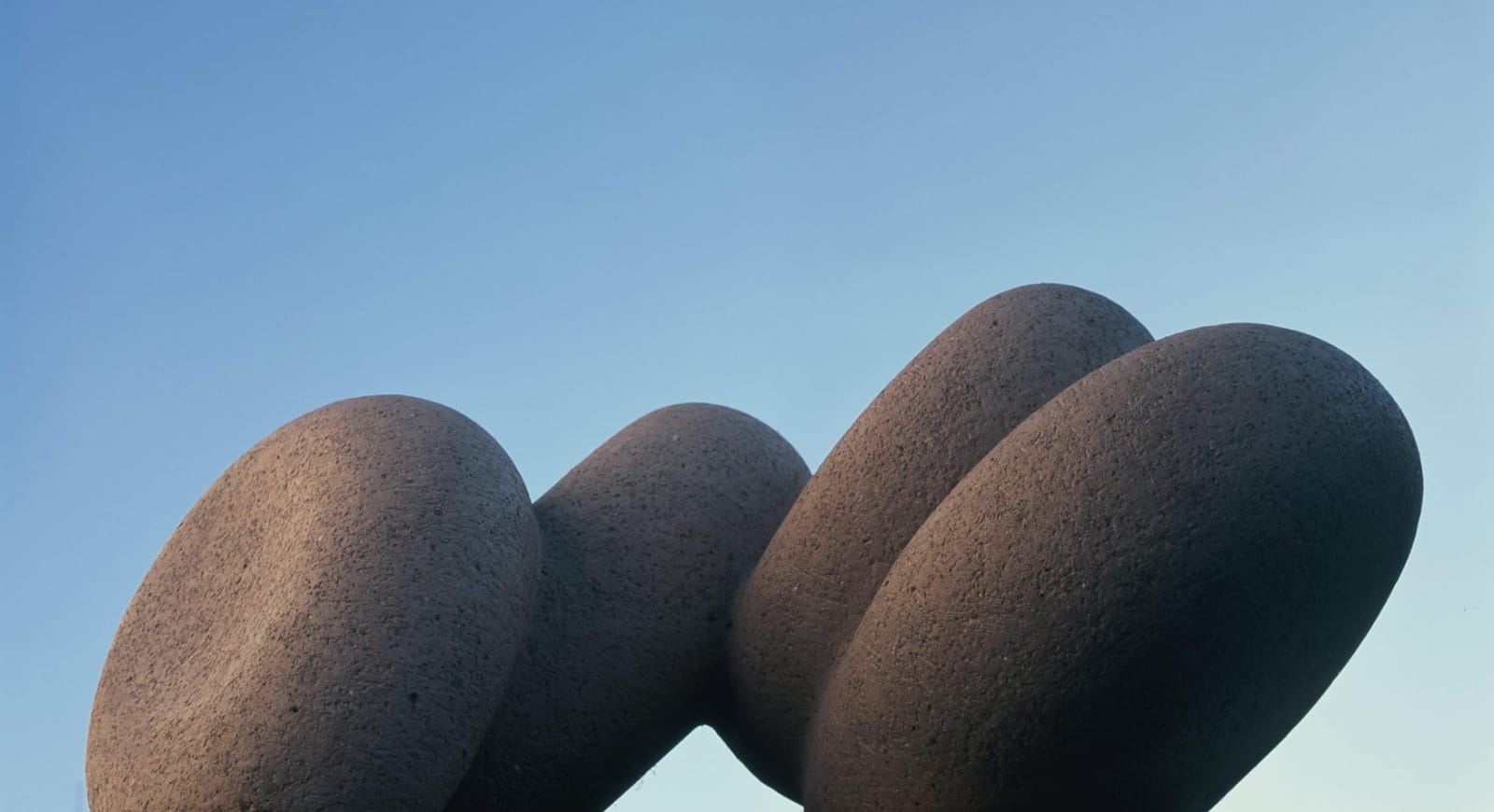 Naslagano, 1983. Terakota